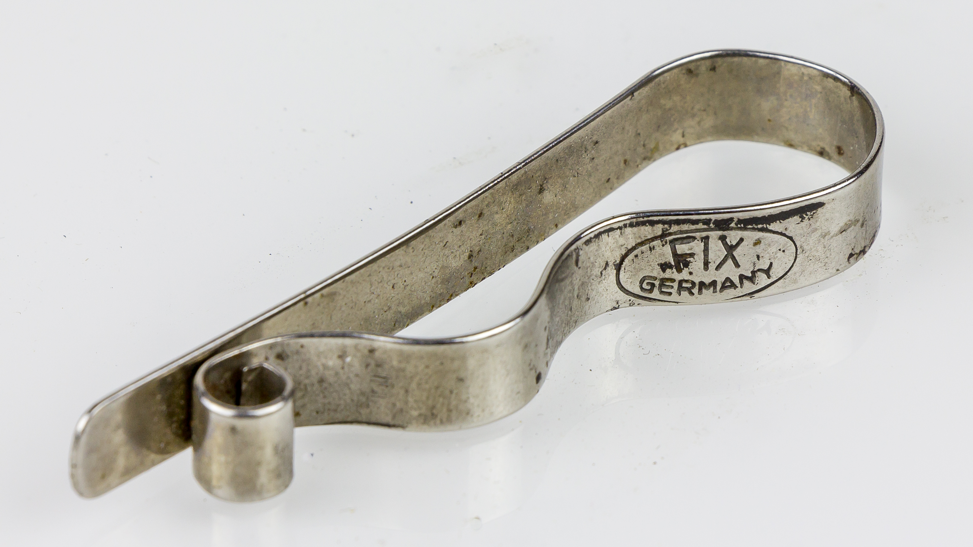 Hosenklammer